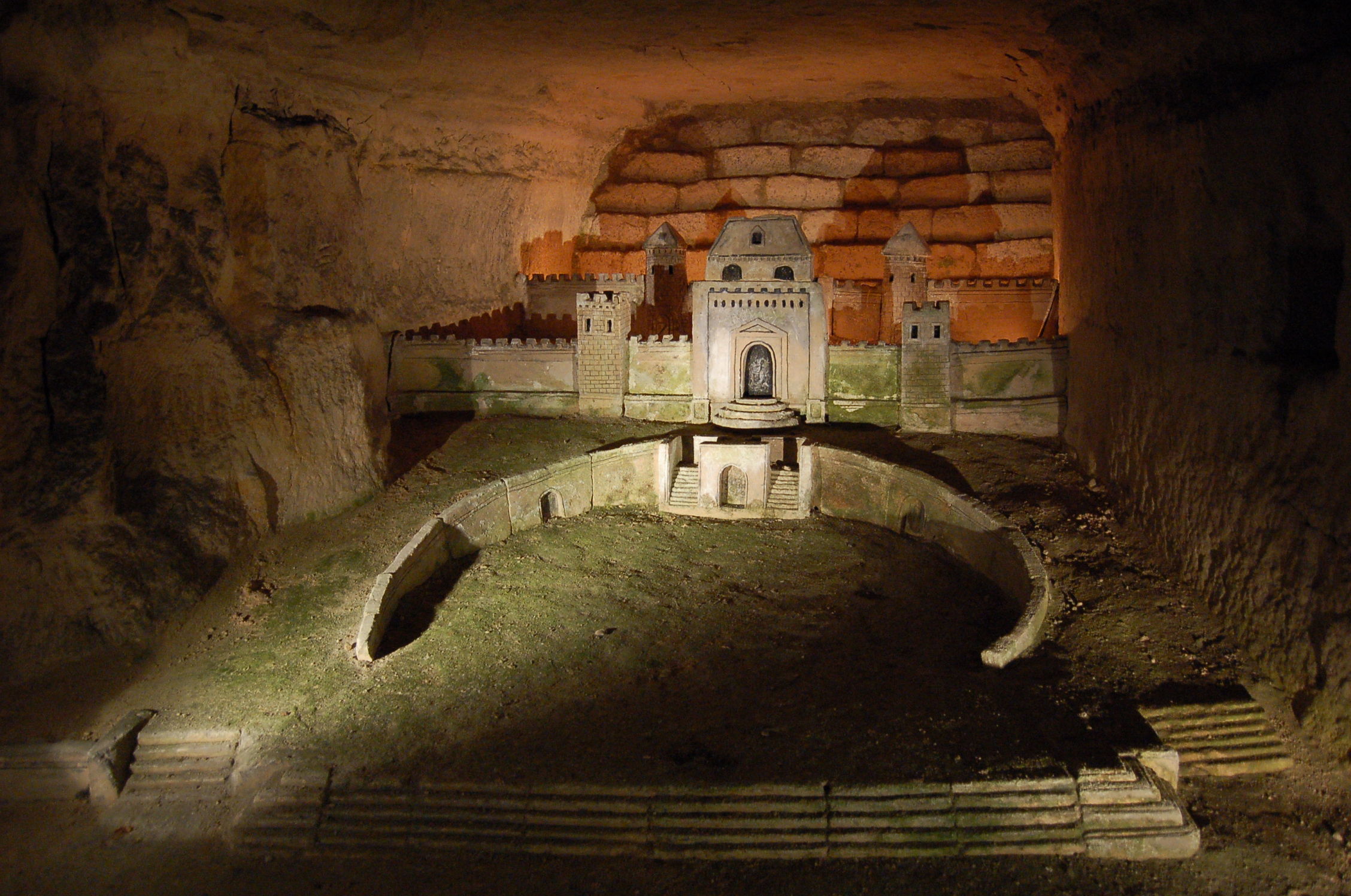 Sculpture dans les catacombes de Paris